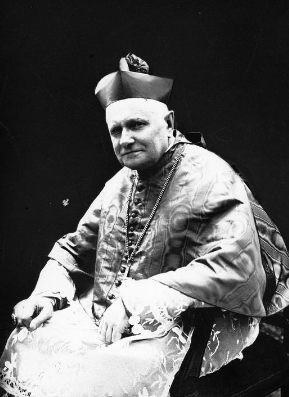 Biskup Antoni Julian Nowowiejski